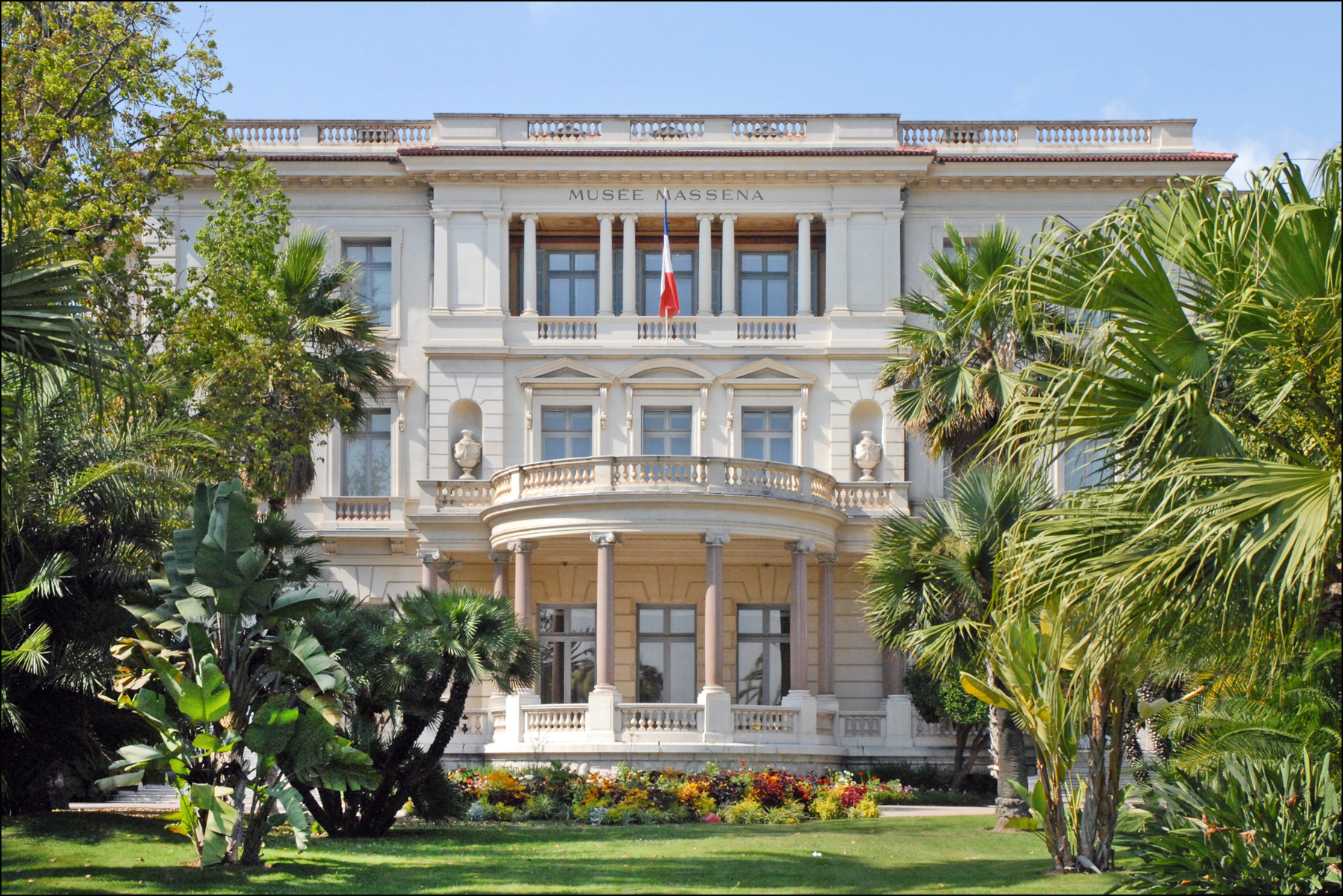 La façade sud du musée Masséna et la partie centrale du jardin La villa Masséna, dans laquelle se trouve aujourd'hui le musée Masséna, a été édifiée sur la Promenade des Anglais à Nice entre 1898 et 1901 par l'architecte danois Hans-Georg Tersling (1857-1920) à la demande du Prince Victor d'Essling (1836-1910), petit-fils du niçois André Masséna, Maréchal d'Empire. André (1891-1947), le fils du Prince Victor d'Essling en a fait (pratiquement) don à la ville de Nice en 1919 à condition que la villa devienne un musée et que le jardin soit public. Les jardins de la villa Masséna sont l'oeuvre du paysagiste Edouard André (1840-1911). Sur la Côte d'Azur, il est l'auteur de 11 parcs et jardins dont ceux du Casino de Monte-Carlo (1878). Le musée Masséna inauguré en 1921 évoque par son architecture et ses espaces intérieurs la Belle Epoque de Nice et présente l'histoire du Comté de Nice. Le bâtiment et les jardins ont été récemment restaurés et la muséographie a été revue. L'accès au musée Masséna est, comme pour tous les musées municipaux ou départementaux, gratuit, ce qui a fortement fait progresser la fréquentation. Site du musée Masséna